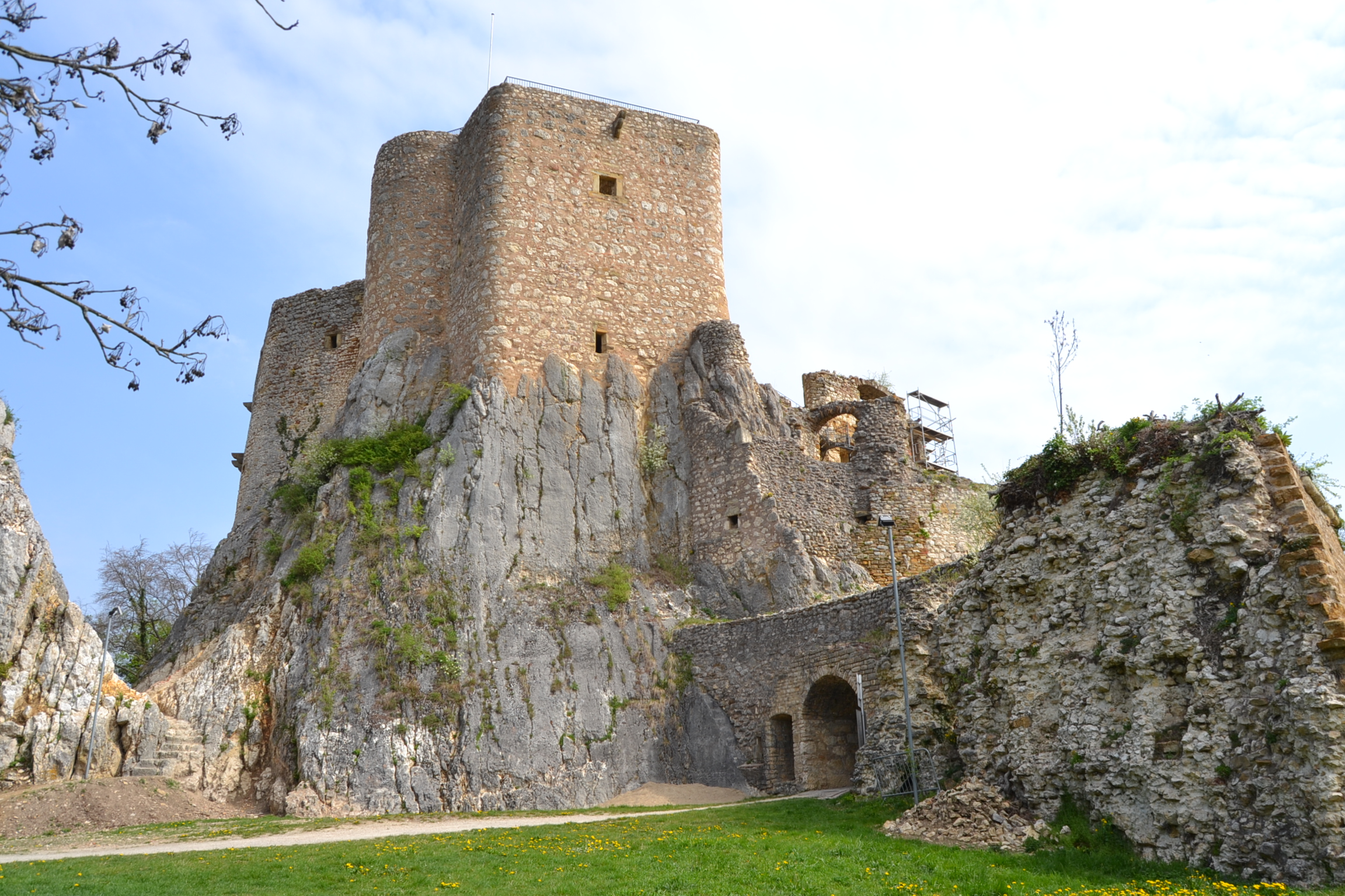 2017-04-11 Landskron 125